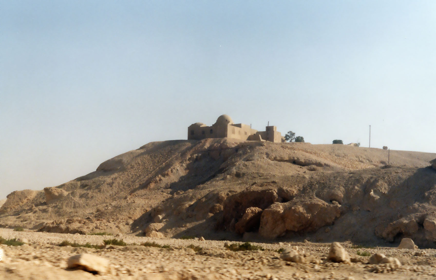 Stoppelaere House. This image was copied from it. The original description was: Autore: Erica (figlia di Utente:Hotepibre); Località e data: Valle dei Re, dicembre 2000; Soggetto: la casa di Howard Carter, scopritore della Tomba di Tutankhamon, all'inizio della Valle dei Re).